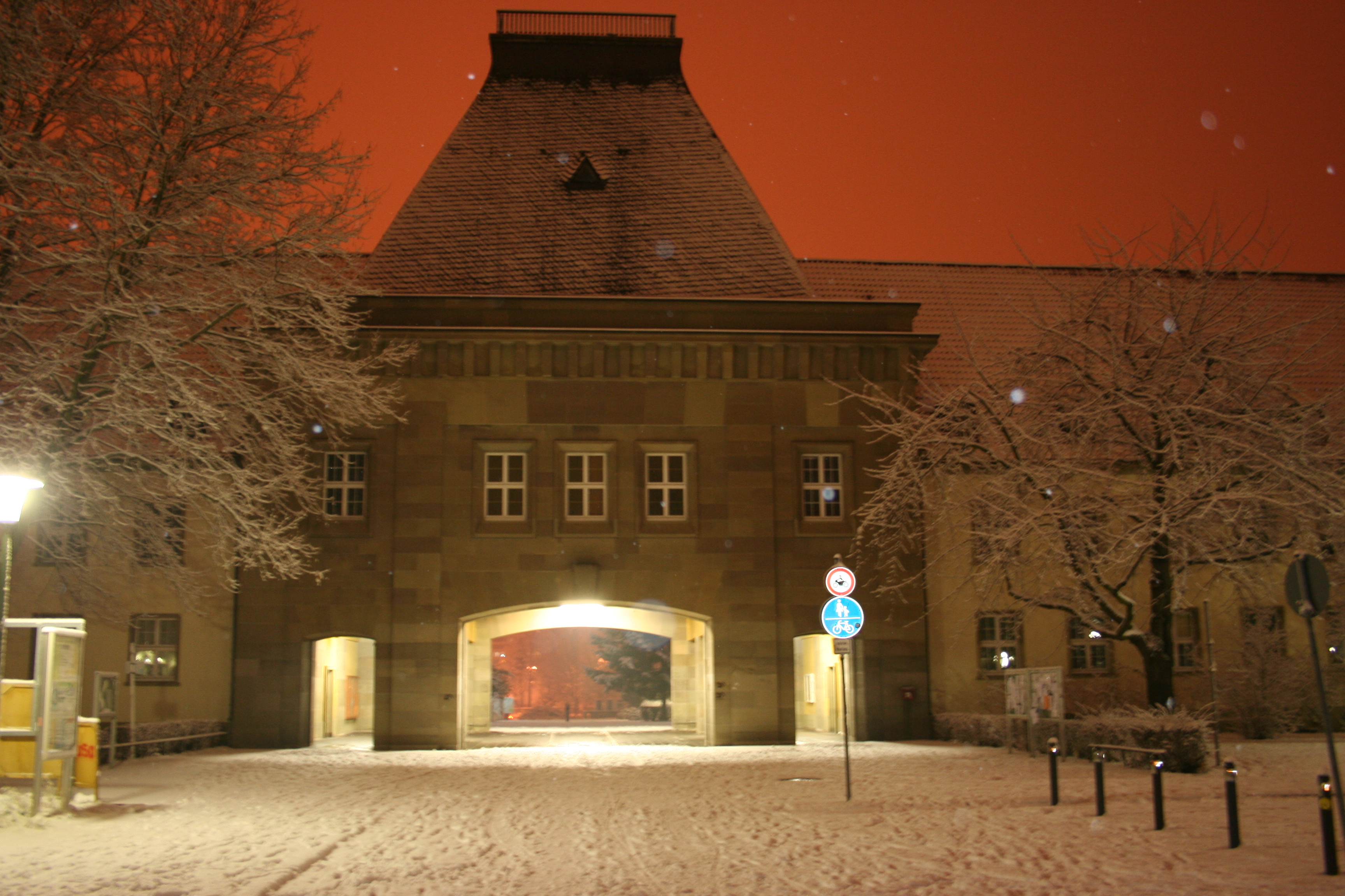 Uni Mainz, Forum, Rückseite